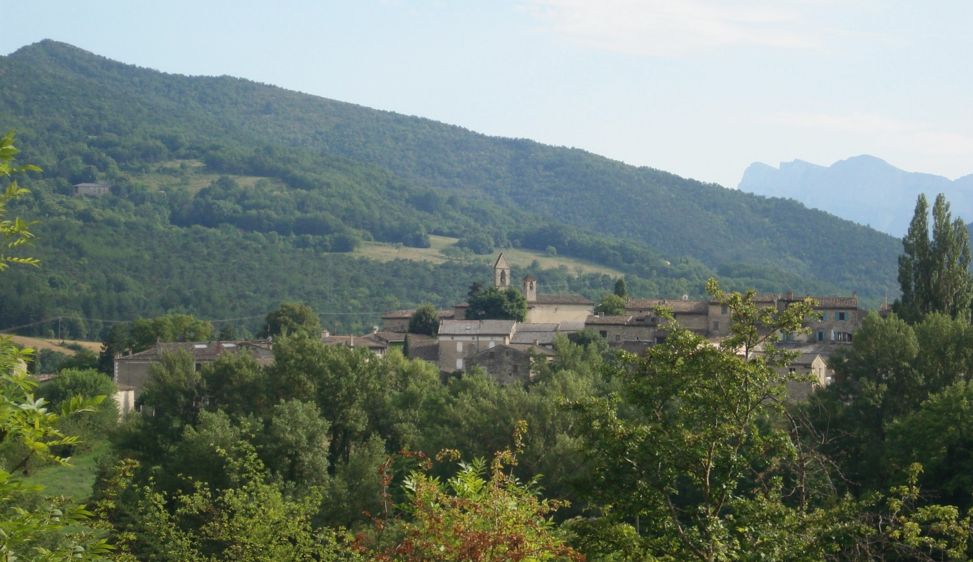 village de Sainte-Croix (Drôme) près de Die